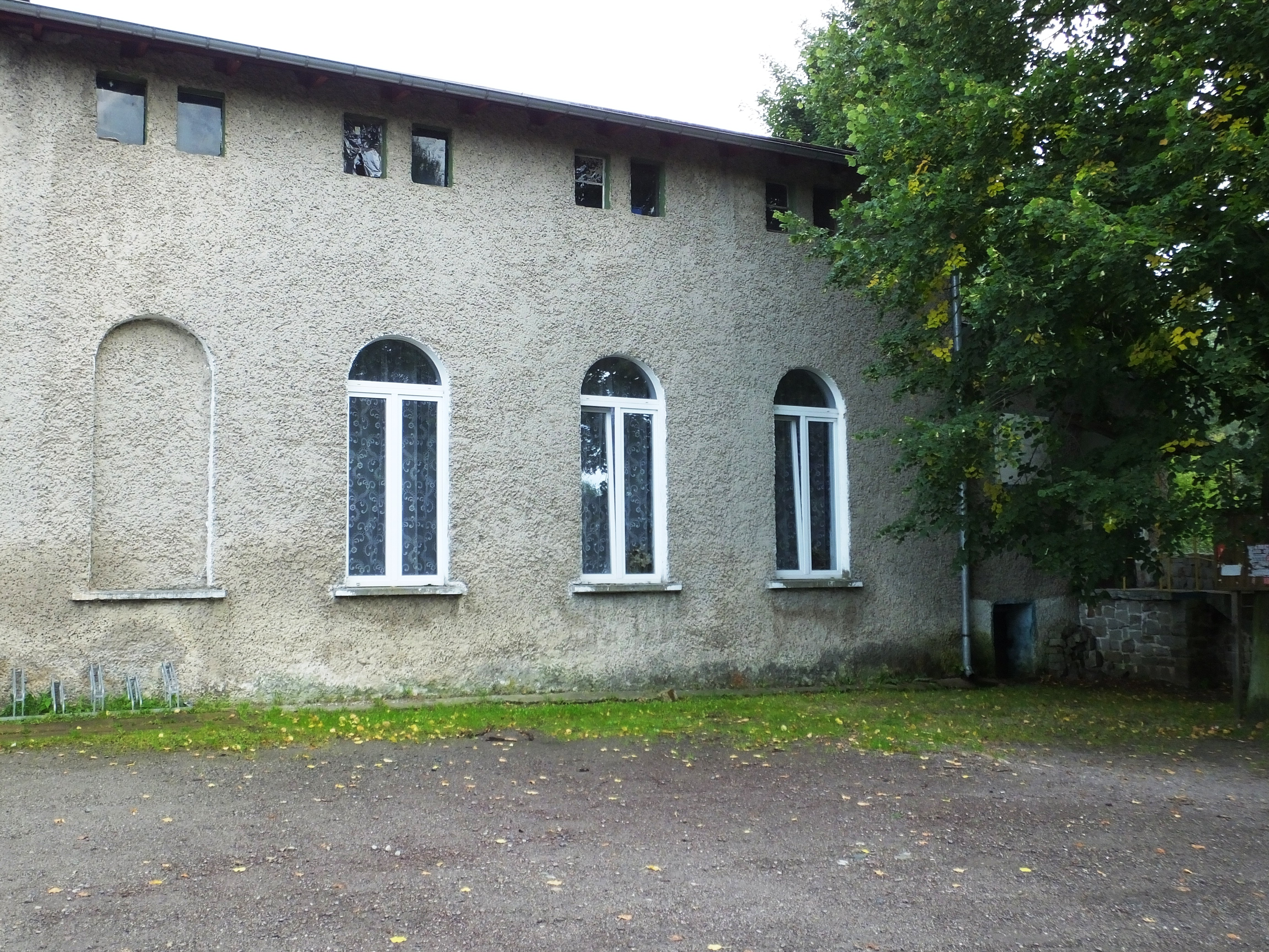 Świetlica w Błażkowej k/Lubawki